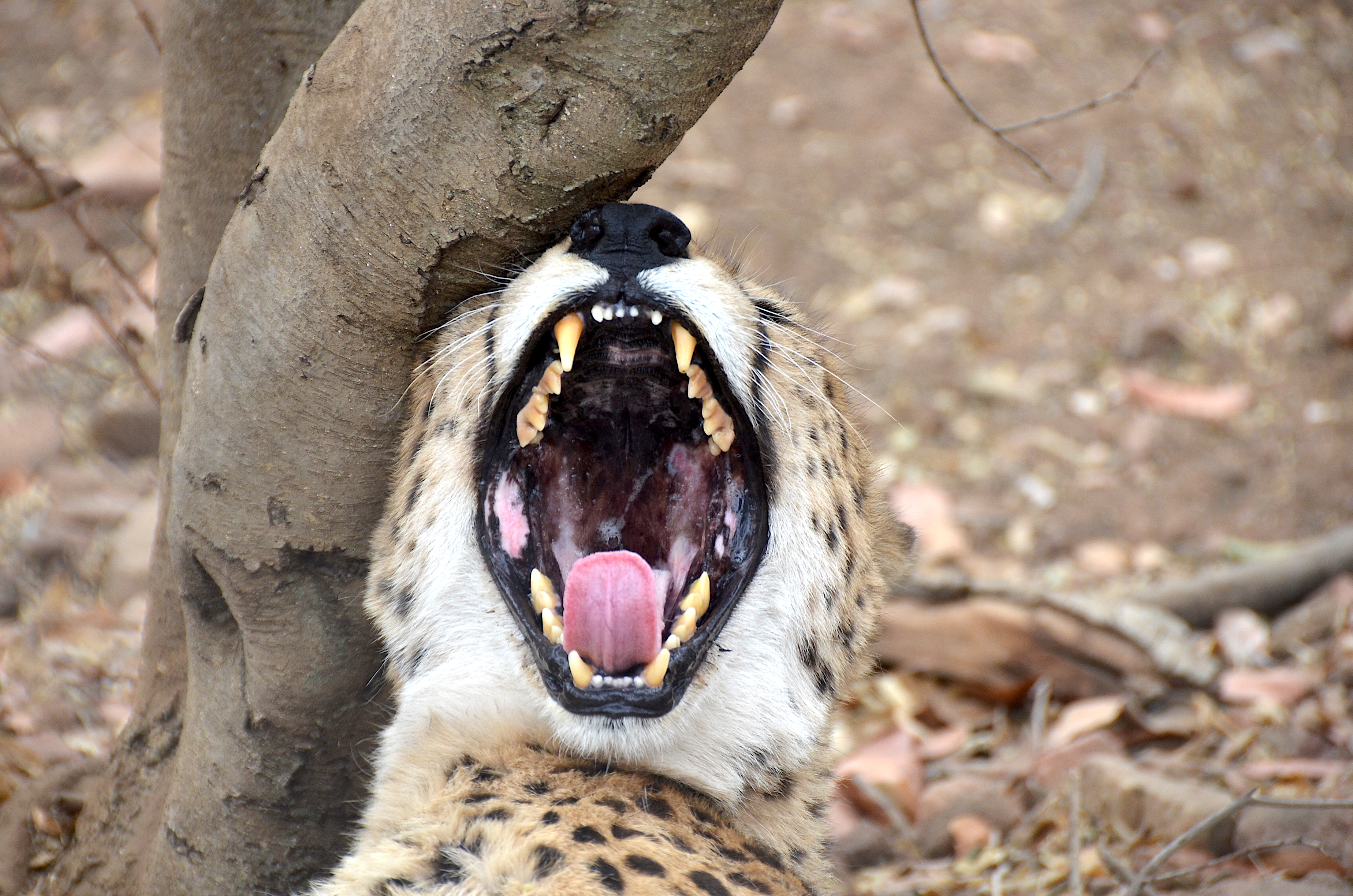 Gepard im De Wildt Cheetah Research Centre in Südafrika